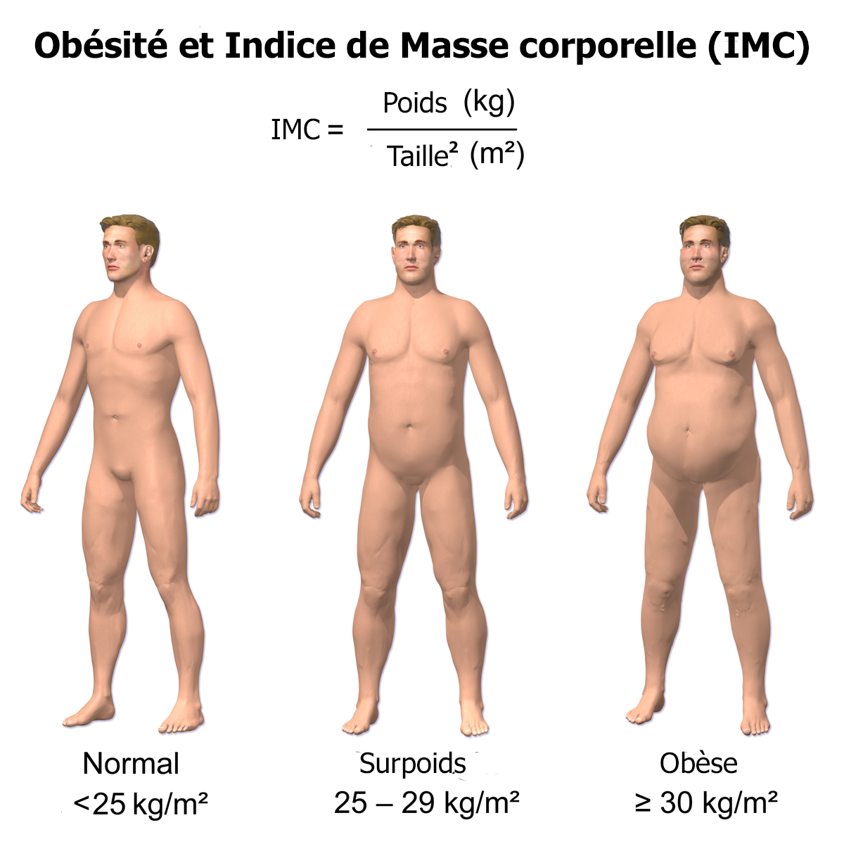 Hommes de diverses corpulence selon leur IMC.